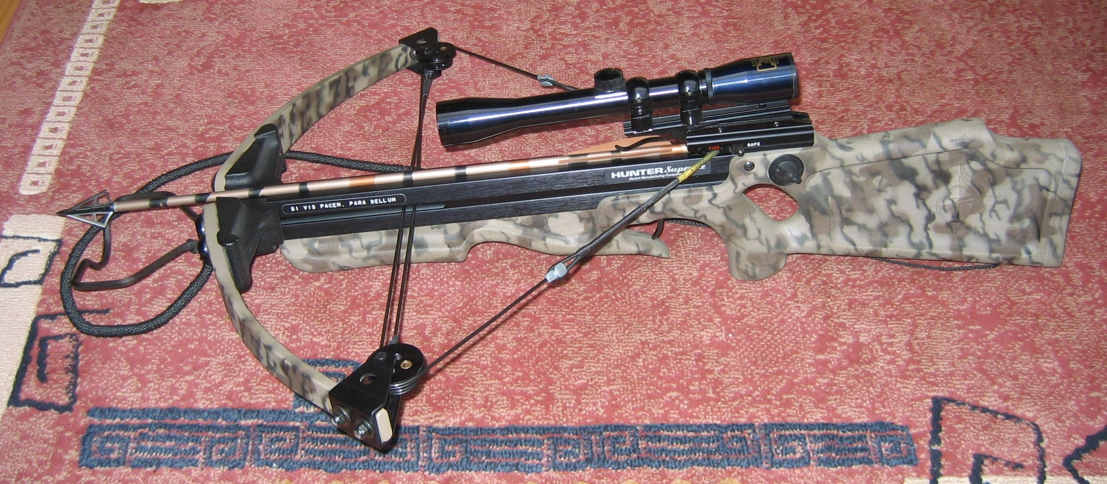 moderne Compound-Armbrust des Herstellers Horton Modell "Hunter Supreme" mit 4x32 Zielfernrohr (Barnett); 22' Pfeil mit "Bruin"-Jagdspitze Photo by Immo G. von Eitzen (selbst)